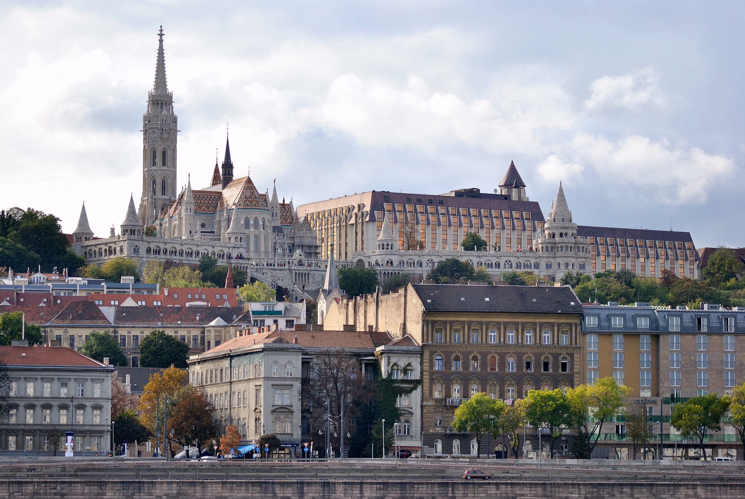 Mátyás templom (Budapest 1, Szentháromság tér) This is a photo of a monument in Hungary. Identifier: 139